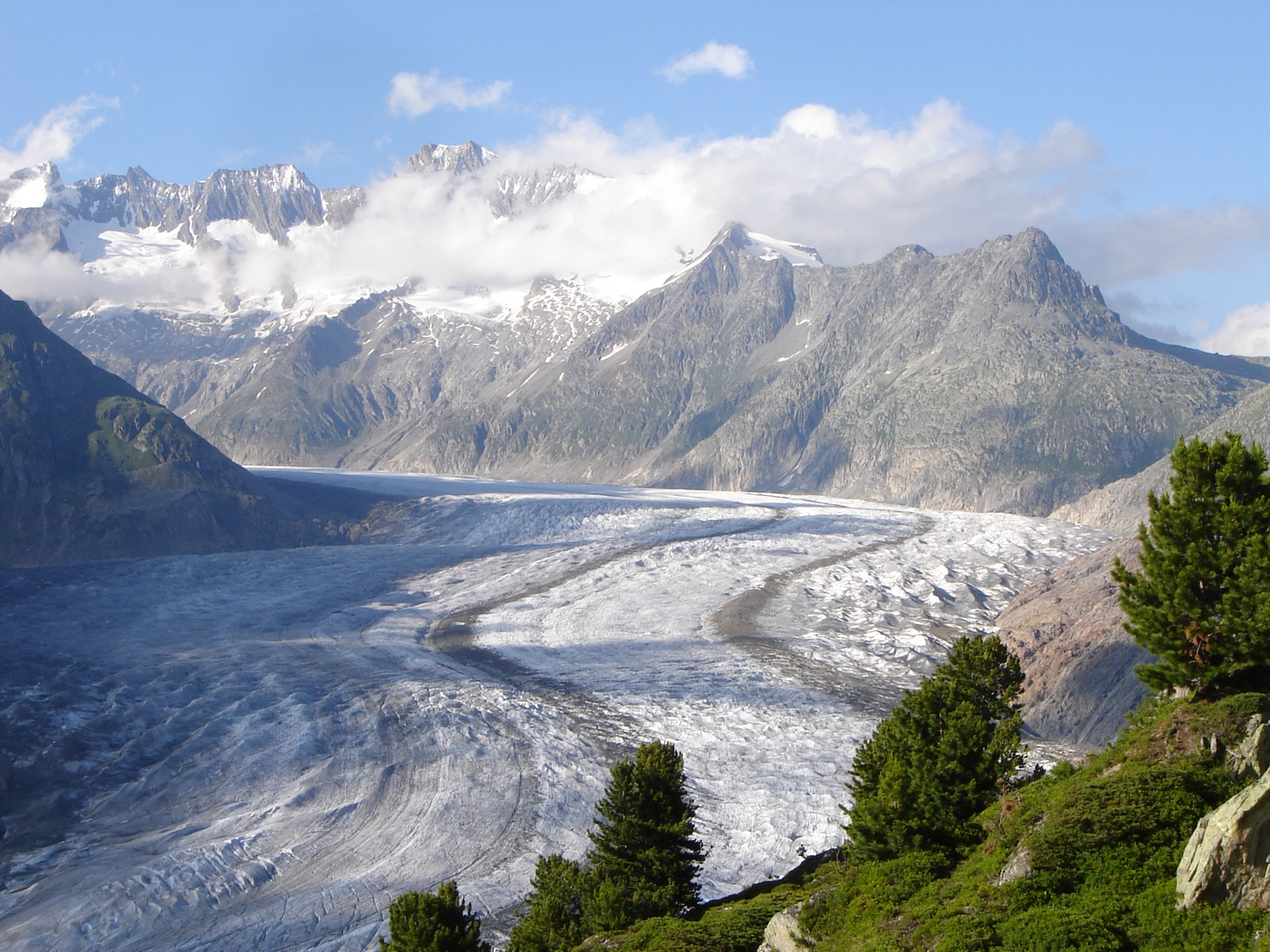 Aletschgletscher mit Pinus cembra